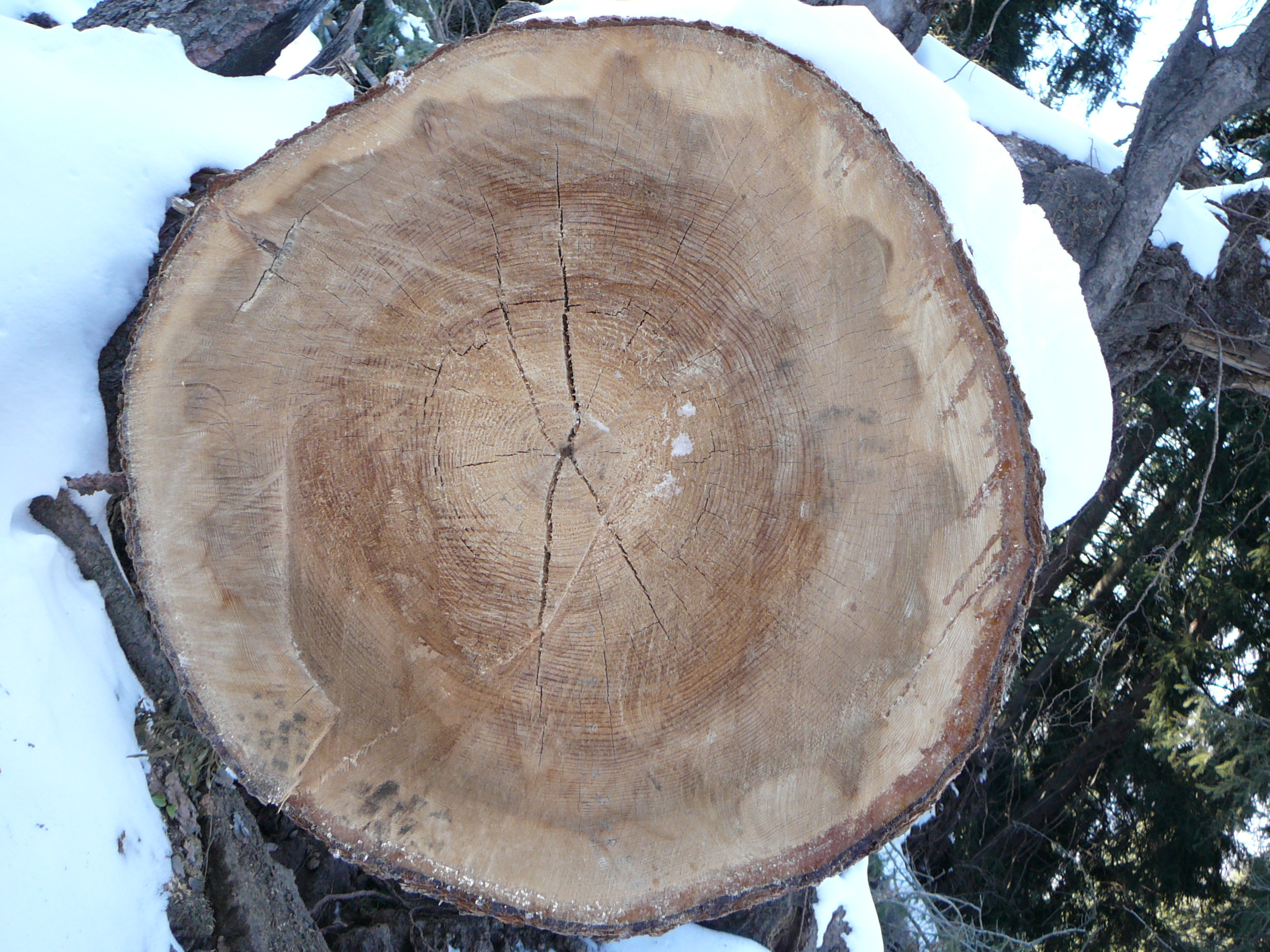 Срез ствола тянь-шанской ели, упавшей после урагана в окрестностях Медео в мае 2011-го. На расстоянии 1 метра от основания ствол имеет в диаметре 80 сантиметров. По количеству годовых колец возраст дерева 132 года.